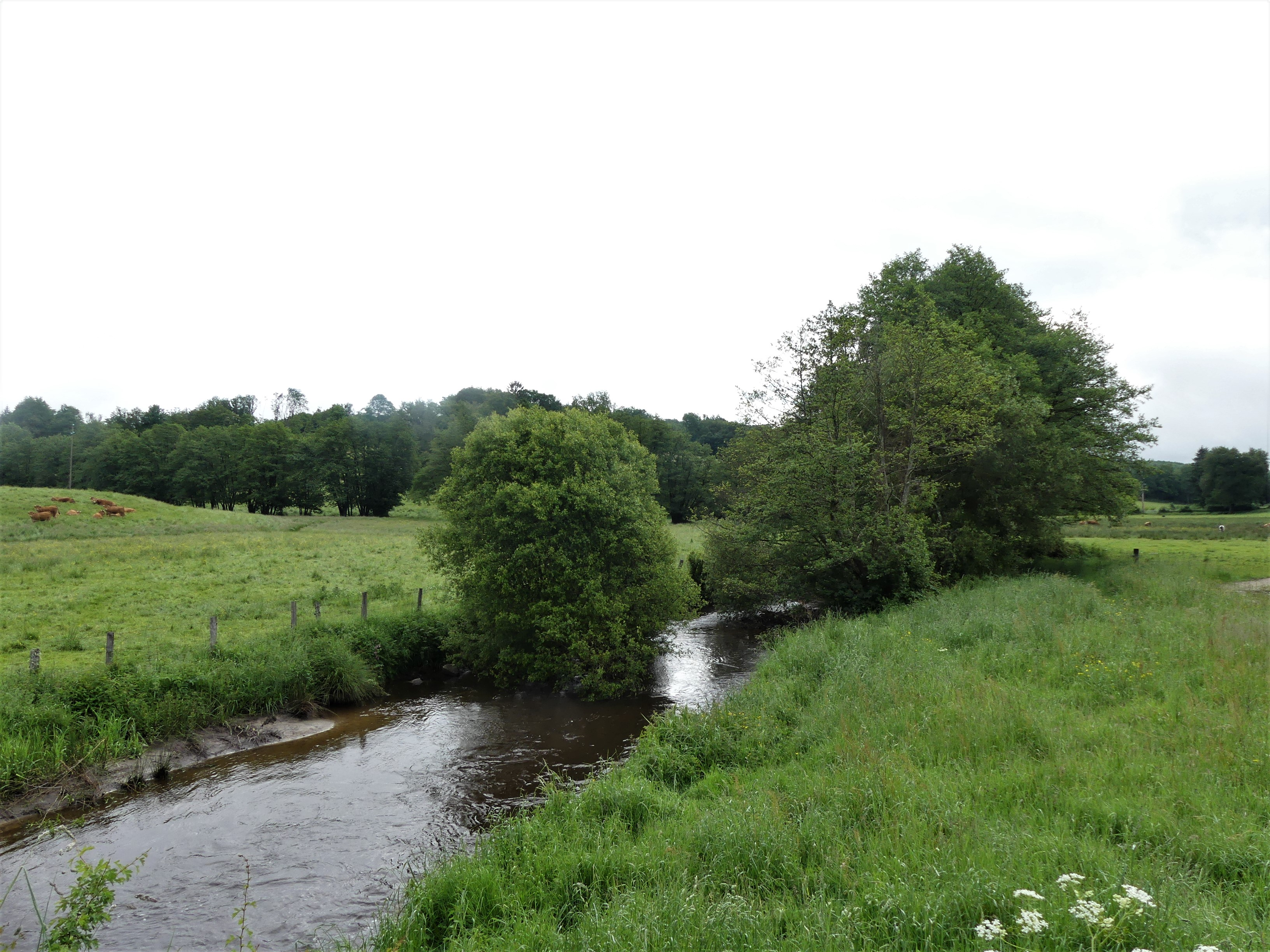 La Banize au sud du bourg de Banize, Creuse, France. Vue prise en direction de l'amont.